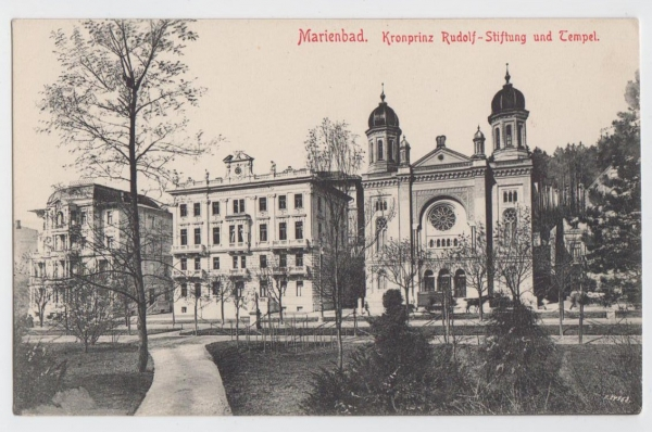 Marienbad: Kronprinz Rudolf-Stiftung (Militär Curhaus) und Tempel, Verlag Hermann Seibt, Meissen, 1906